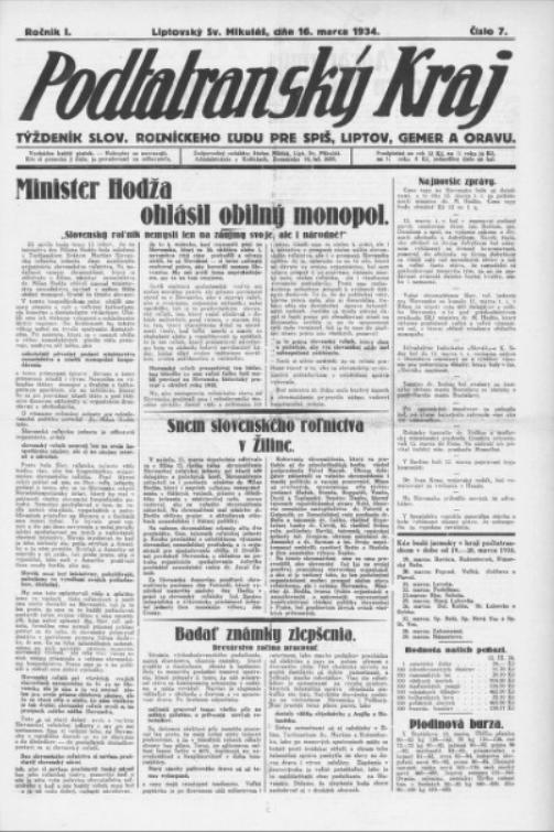 Titulný list týždenníka Podtatranský kraj